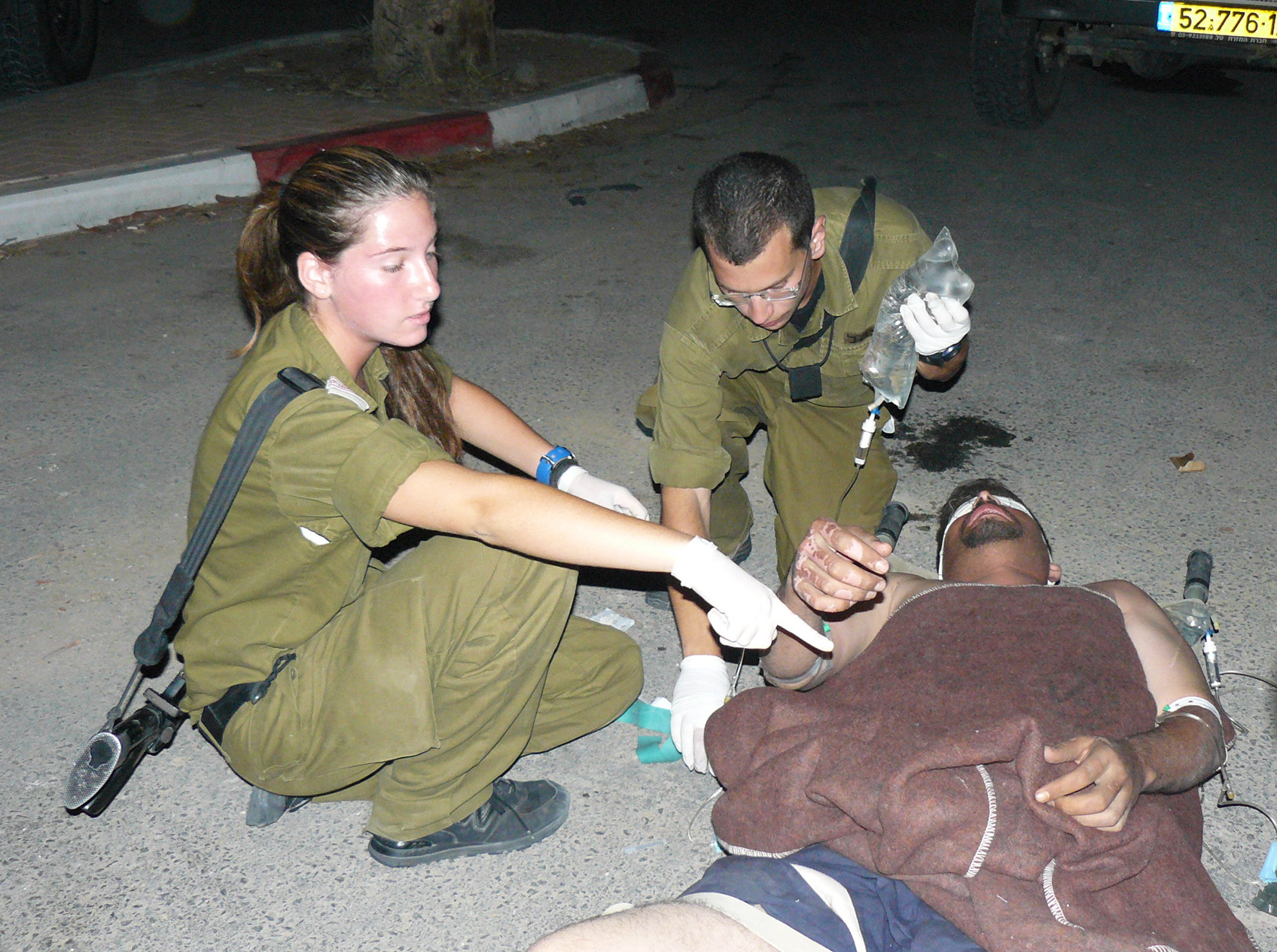 August 3, 2008. A Palestinian receiving medical care from IDF soldiers. On August 2, 2008, approximately 180 Palestinian Fatah activists crossed into Israeli territory, some of them injured. For humanitarian reasons, the IDF allowed Palestinians who disarmed to enter the country. Those injured were given medical treatment inside Israel. פלסטיני מקבל טיפול רפואי מחיילי צה"ל. בתאריך 2/8/08 כ-180 פעילי פת"ח נכנסו לשטחי ישראל כשחלקם פצועים. מסיבות הומניטאריות הרשה צה"ל את כניסתם את הפלסטינים הלא חמושים לגבולות הארץ. הפצועים מבניהם קיבלו טיפול רפואי הולם בתוך ישראל.